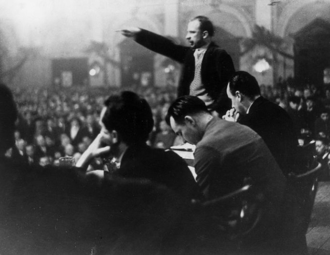 Il comunista Walter Ulbricht parla a un evento congiunto KPD-NSDAP presso il Volkspark Friedrichshain, al confine tra l'omonimo quartiere e Prenzlauer Berg, Berlino, 22 gennaio 1931. L'uomo a sinistra in primo piano, di spalle, è Joseph Goebbels, Gauleiter nazionalsocialista di Berlino.